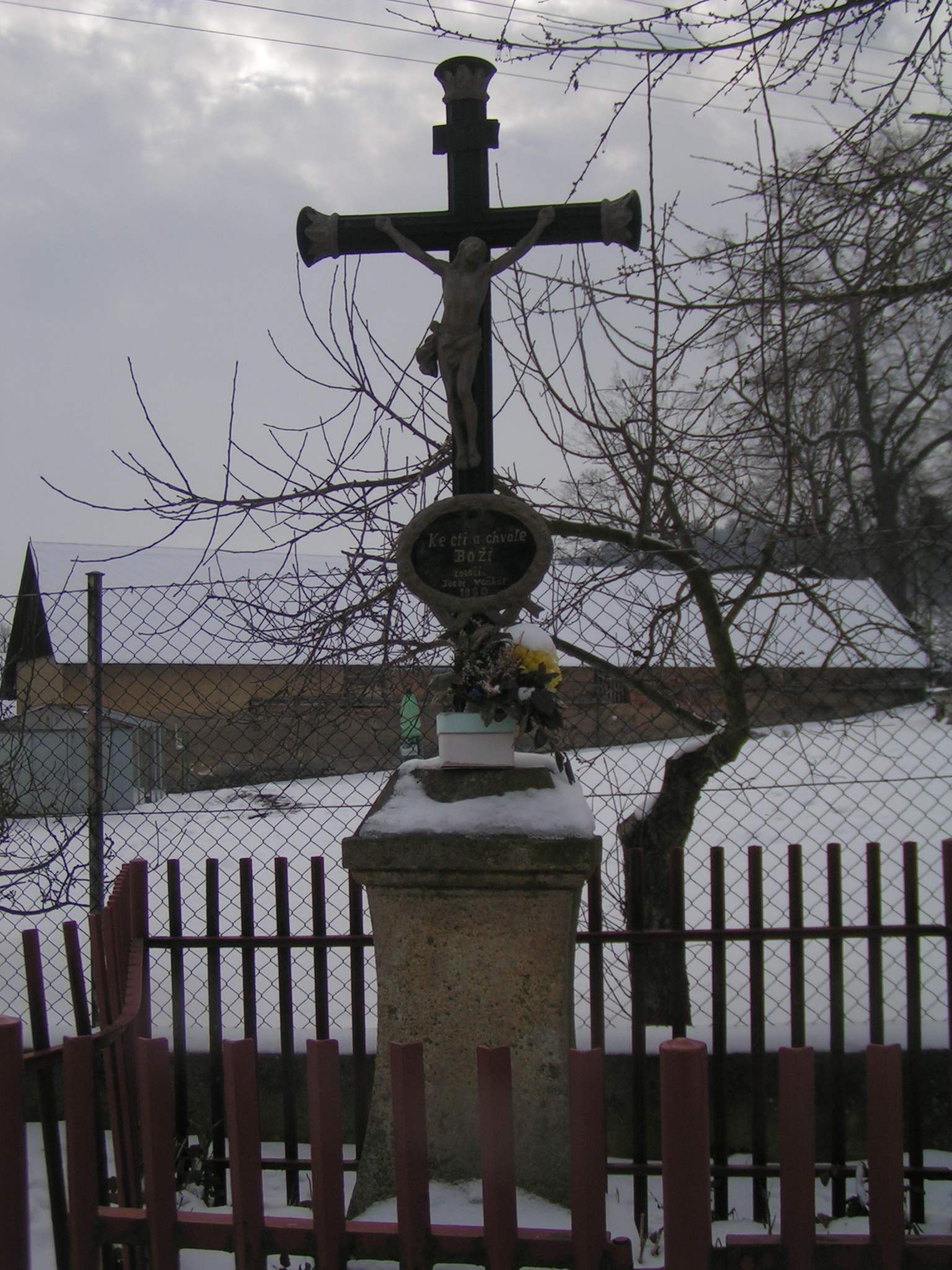 Česky: Křížek v Kochánově